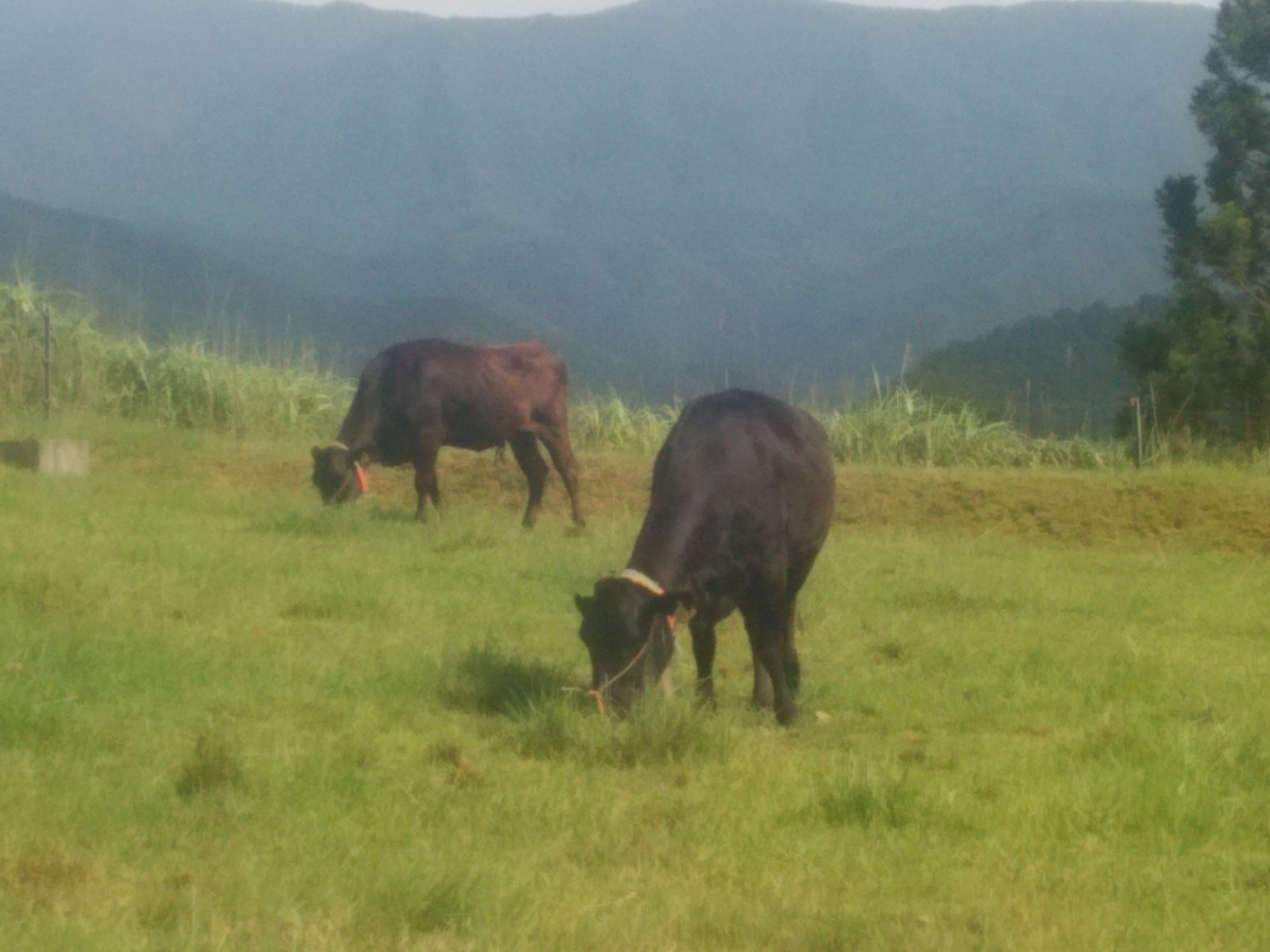 大和牛のふるさと「みつえ高原牧場」